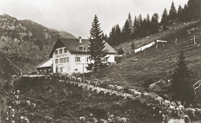 Postkarte mit der Beschriftung «Kurhaus Sücca F. Liechtenstein»